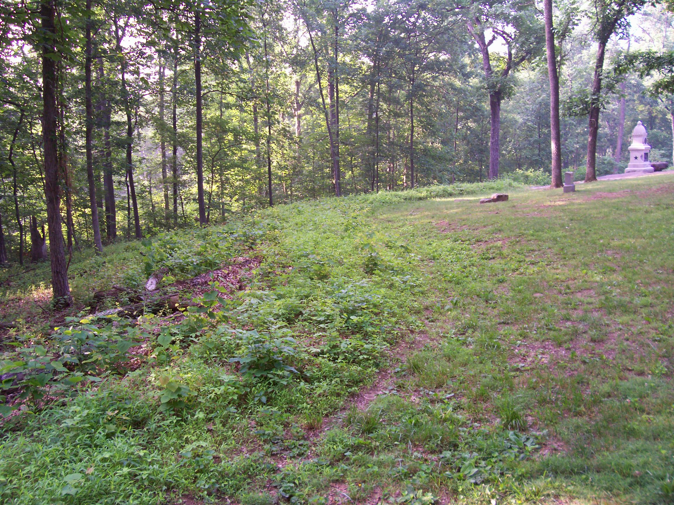 Gettysburg Battlefield